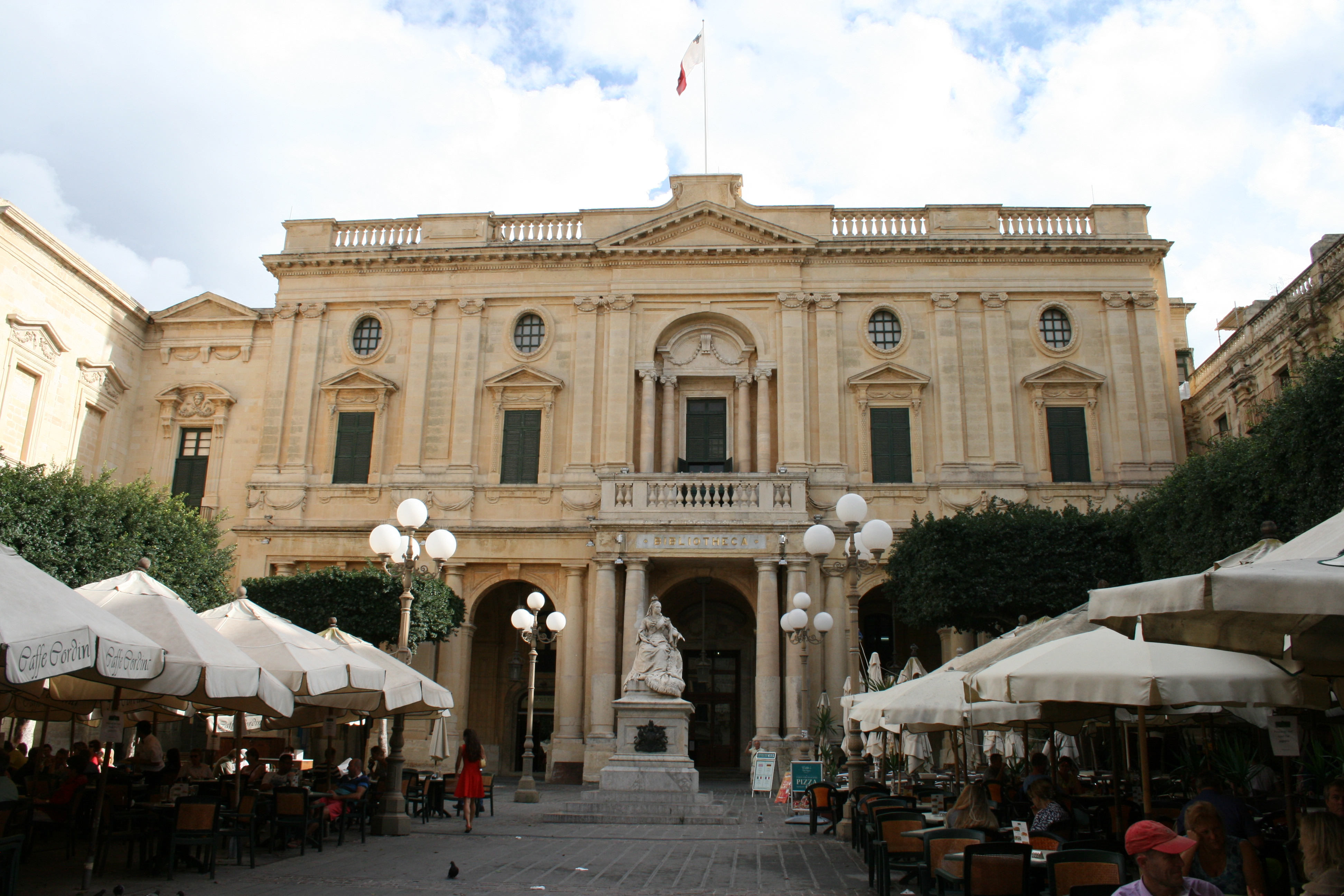 Bibliothek in Malta, in Valletta